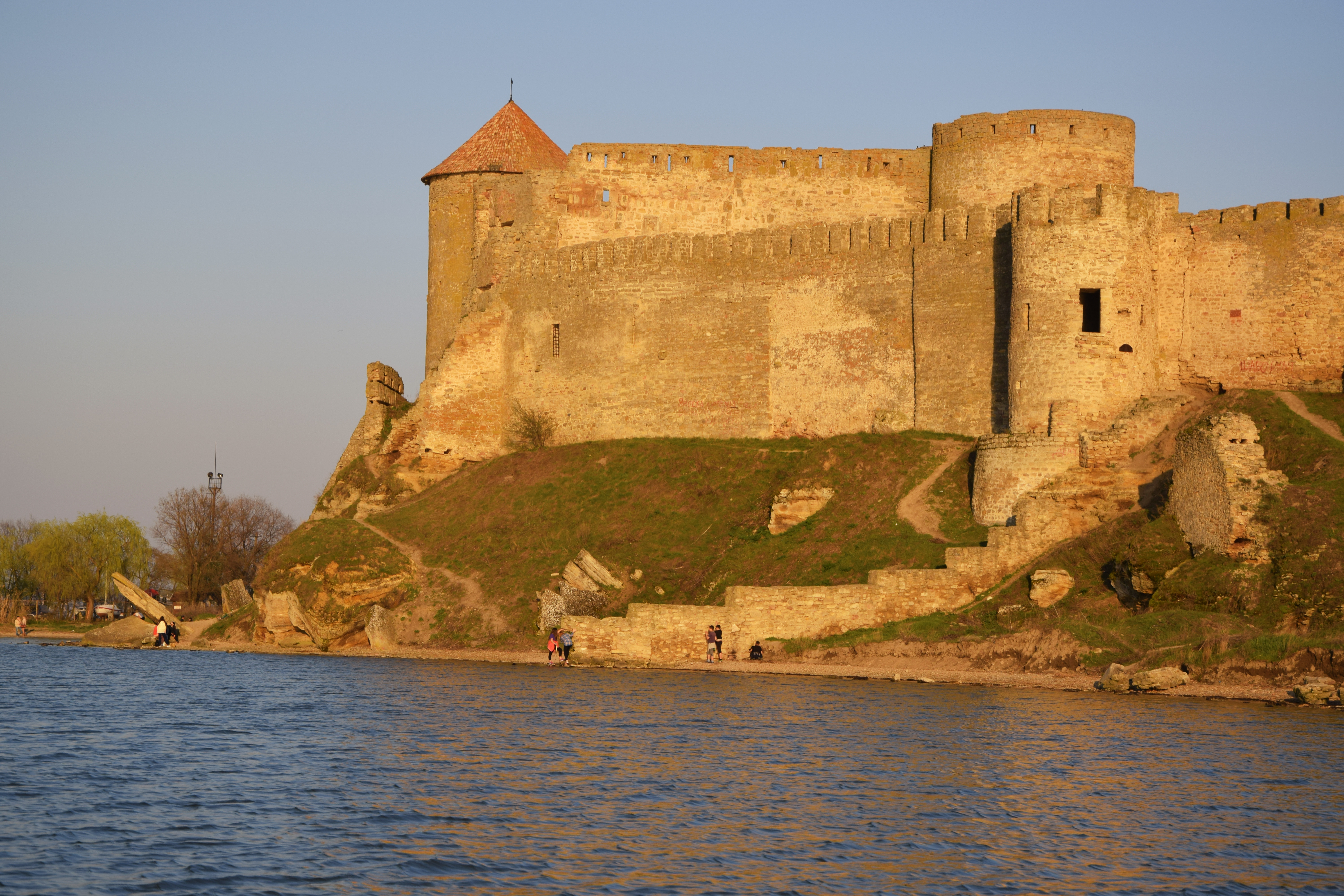 Білгород-Дністровський, башти та мури Аккерманської фортеці з лиману